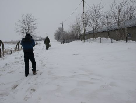 Imagine din luna februarie a anului 2012, când satele comunei au fost izolate de viscol